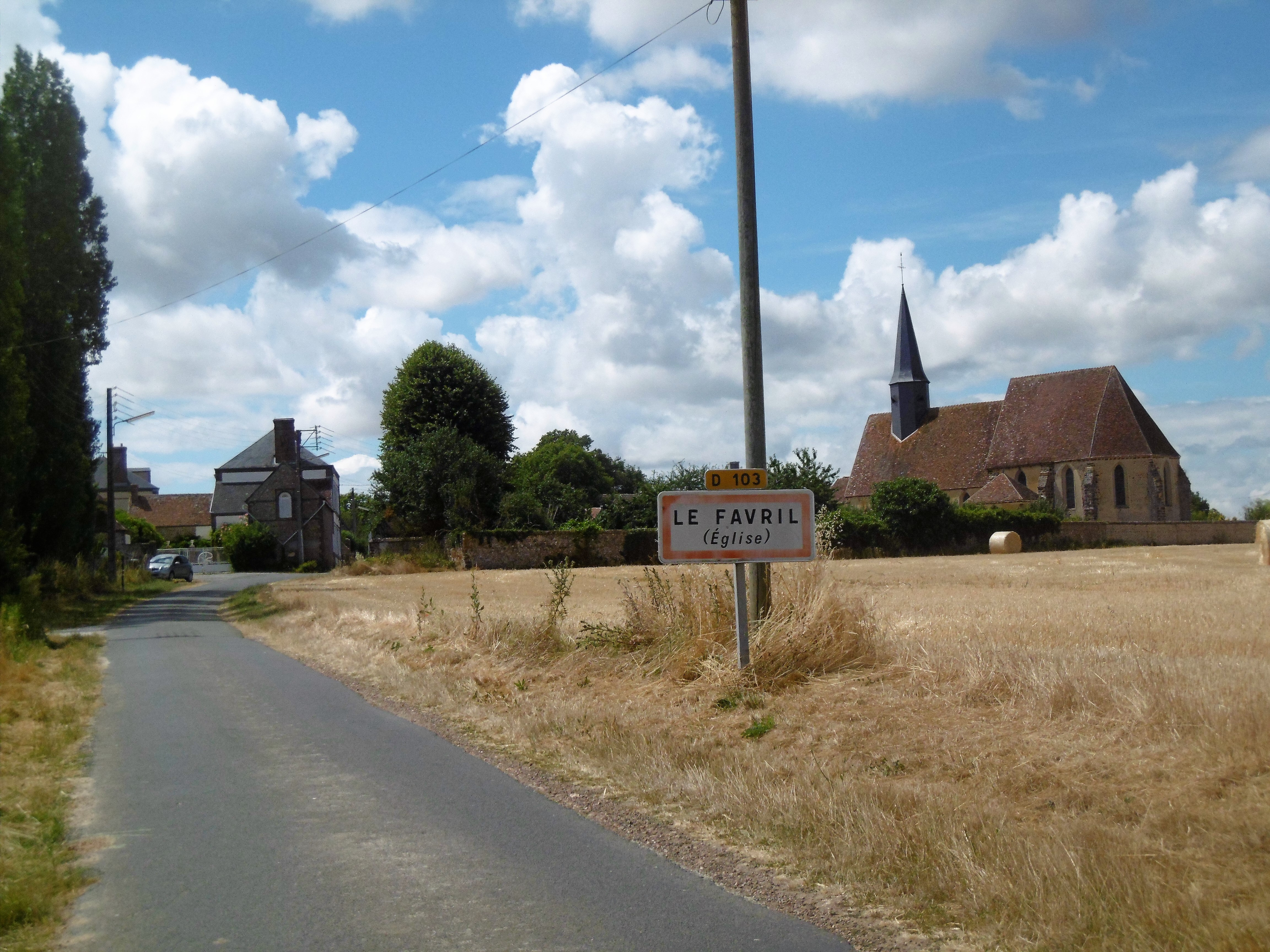 Le Favril vue sur l'église en arrivant de Chuisnes